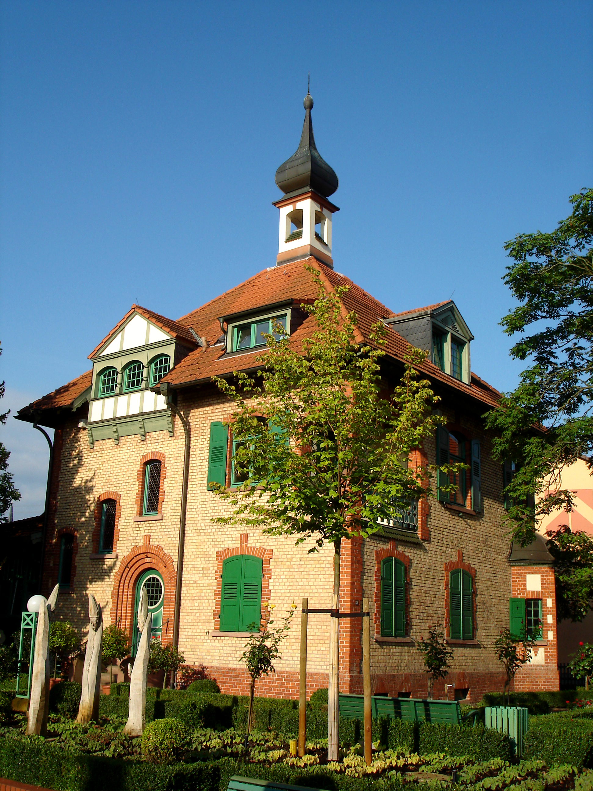 Deutschland: Villa Meixner in Brühl (Baden)